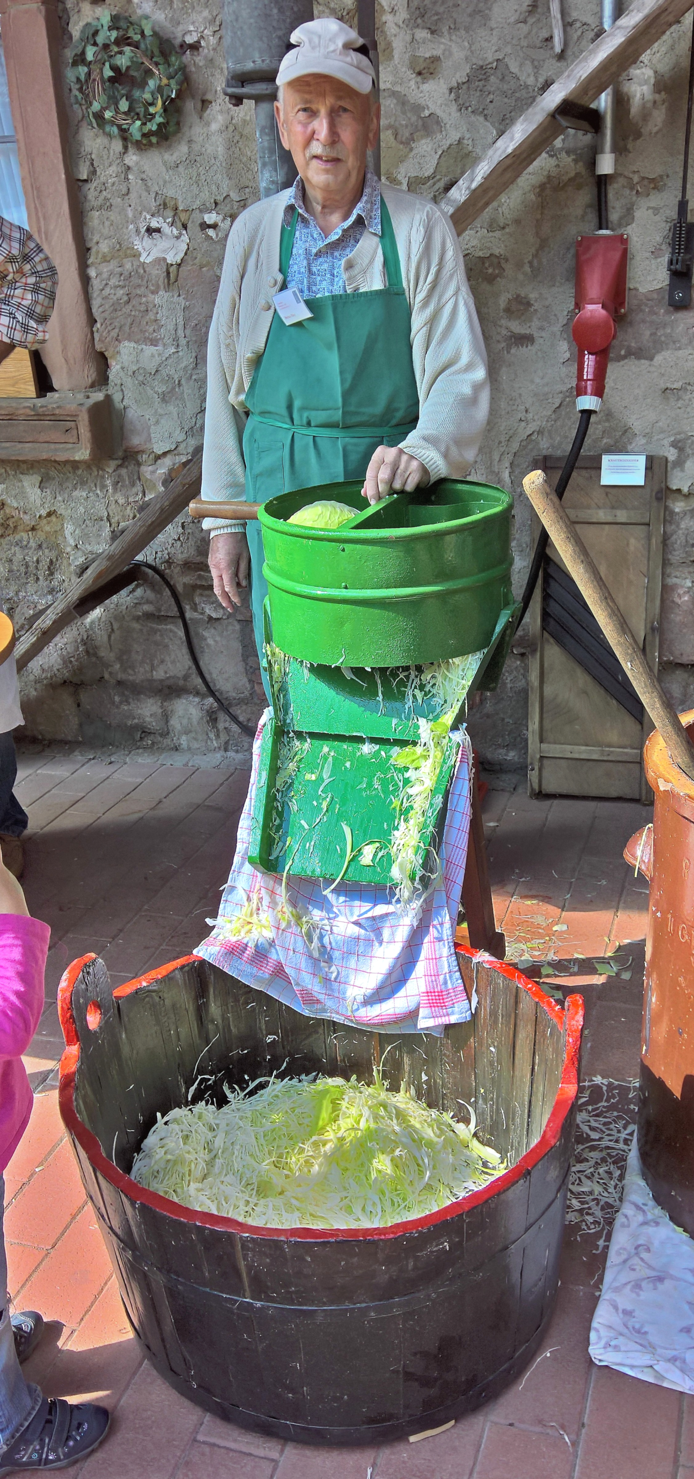 Ein Krauthobelmaschine, mit der im Vergleich zum Krauthobel eine größere Menge handwerklich verarbeitet werden kann. Die Maschine war bis vor wenigen Jahren noch im Einsatz und ist jetzt "aktives"Ausstellungsstück im Umstädter Stadtmuseum Gruberhof beim jährlichen Brauchtumsfest. Rechts im Bild ist im Ansatz der Steintopf mit dem Stampfer zu sehen, in dem das Kraut eingestampft und nur mit jodfreiem Salz gewürzt wird, um es dann mehrere Wochen "reifen" zu lassen.